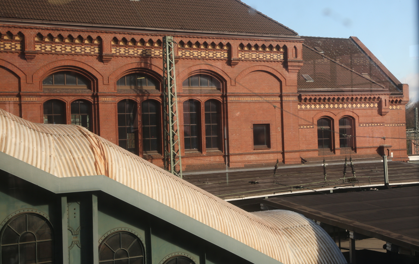 Der Kunstverein Harburger Bahnhof befindet sich im Bahnhof über Gleis 3 & 4.